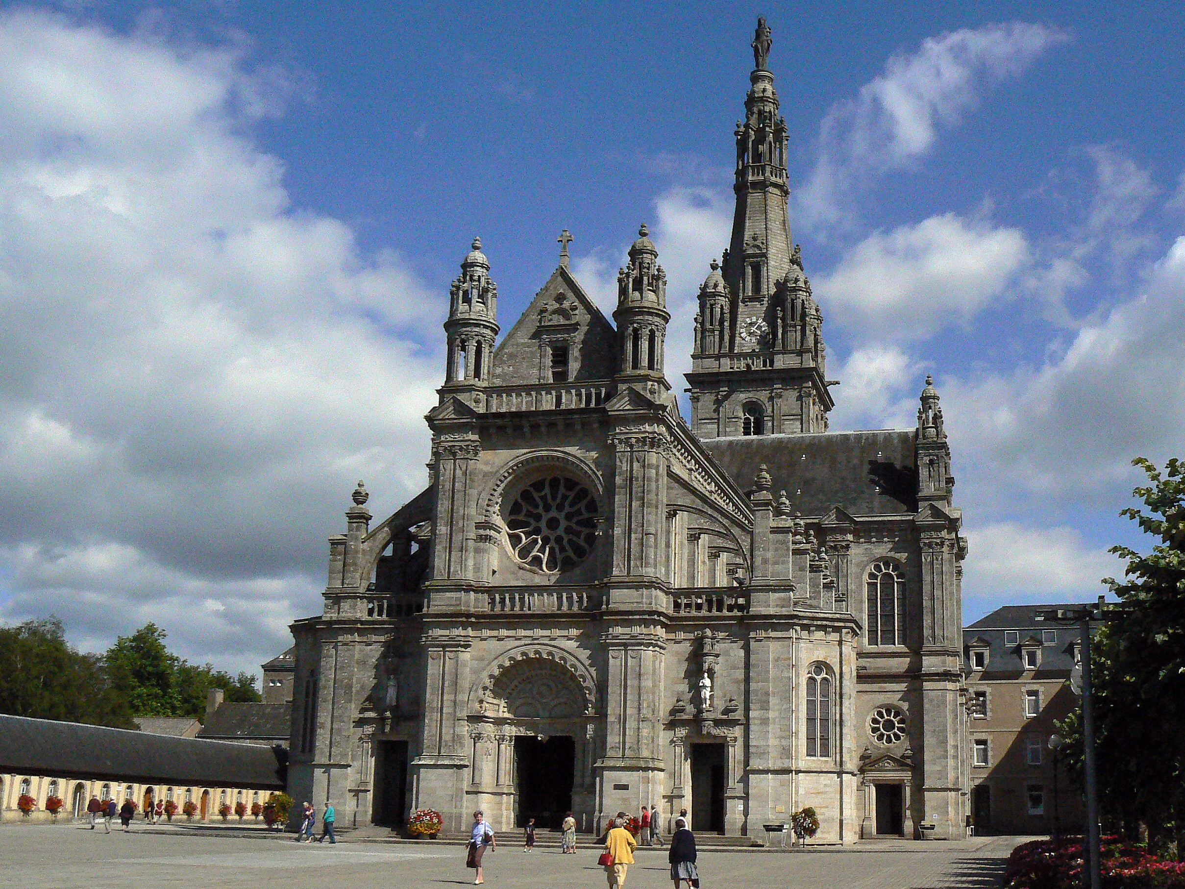 Basilique Sainte-Anne d'Auray (extérieur)